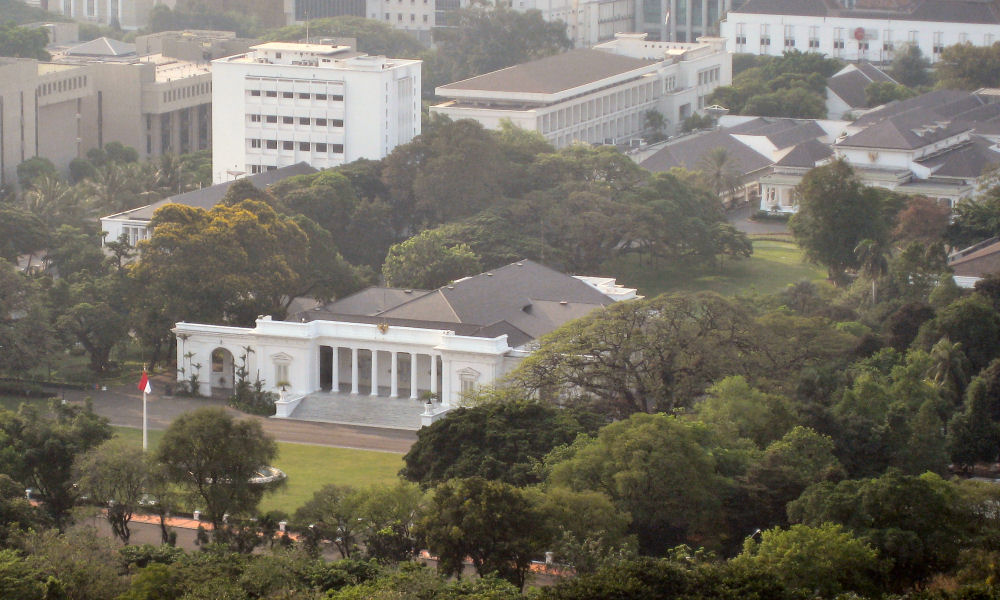 Istana Merdeka in Jakarta, Indonesia